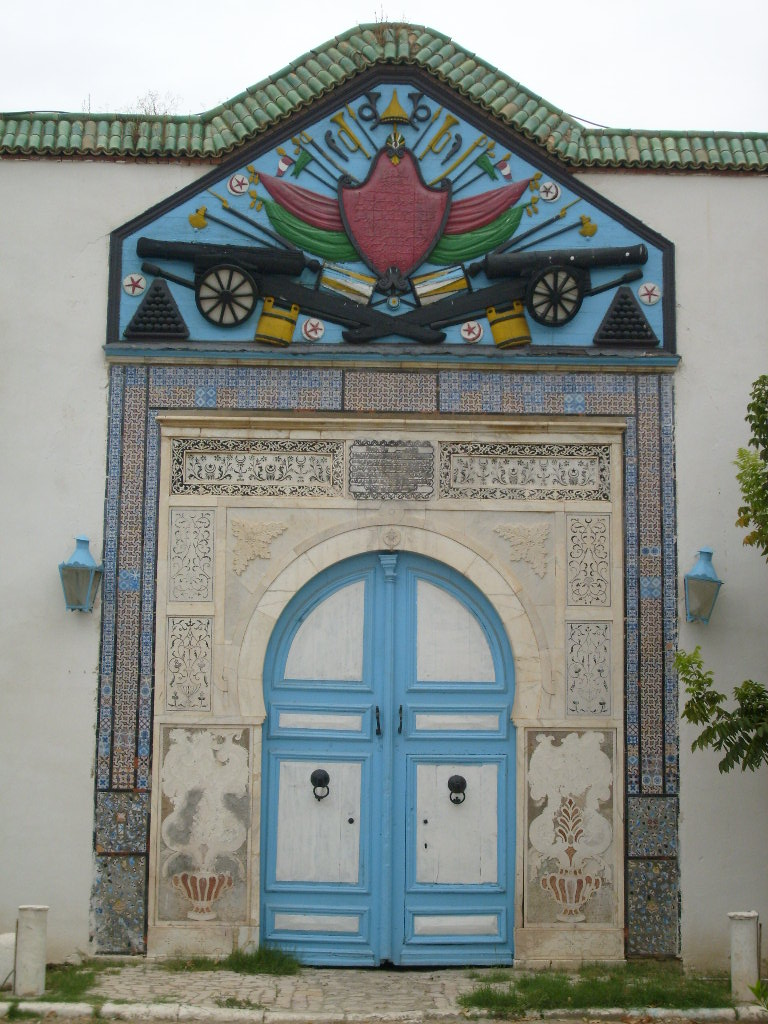 Porte de la caserne militaire du palais du Bardo (Tunisie) surplombée par les armoiries beylicales